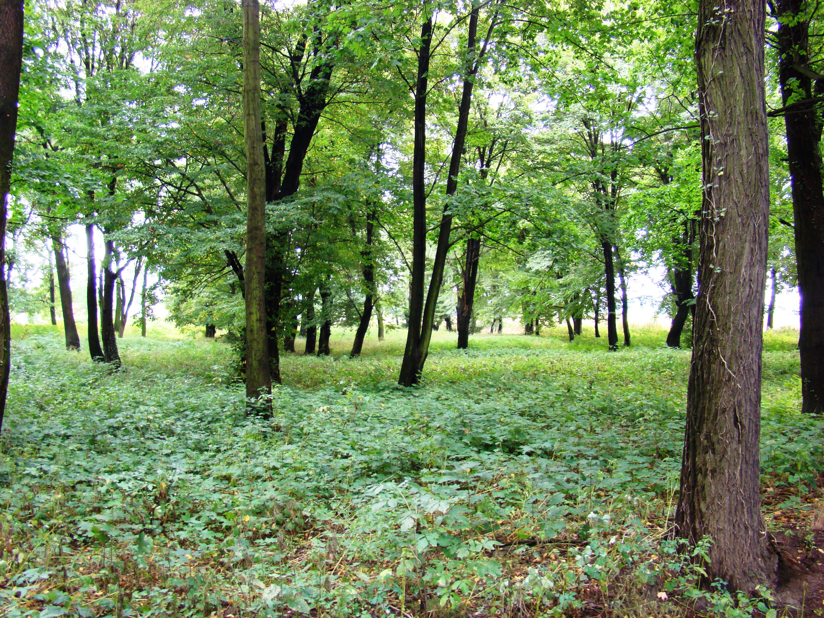 park dworski z XIX wieku Gałązczyce 08.1981.